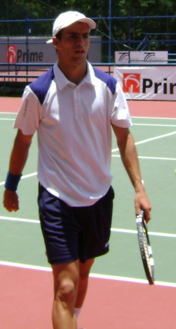 Tenista colombiano Santiago Giraldo, no Aberto de São Paulo de Tênis.